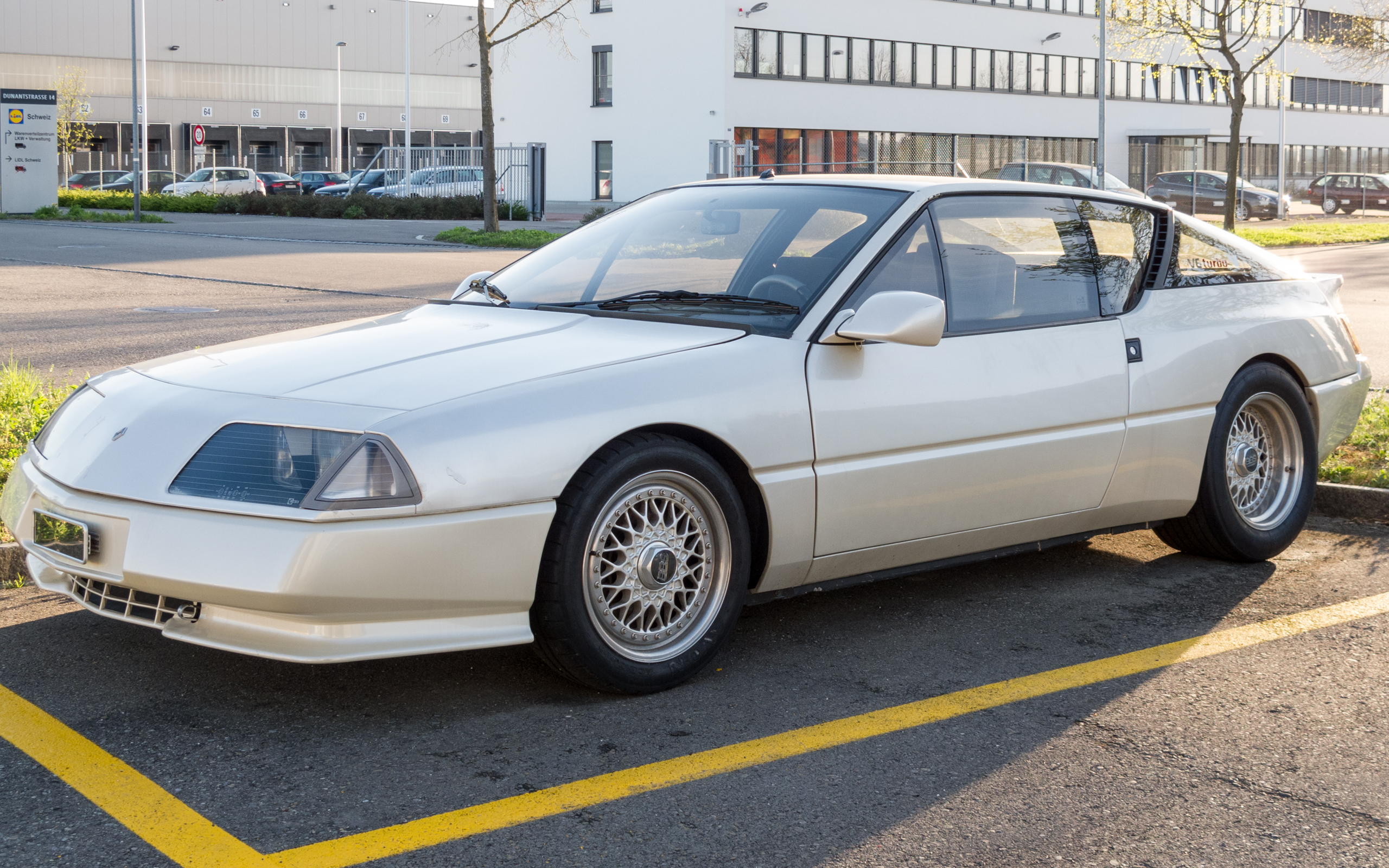 Renault Alpine GTA V6 Turbo